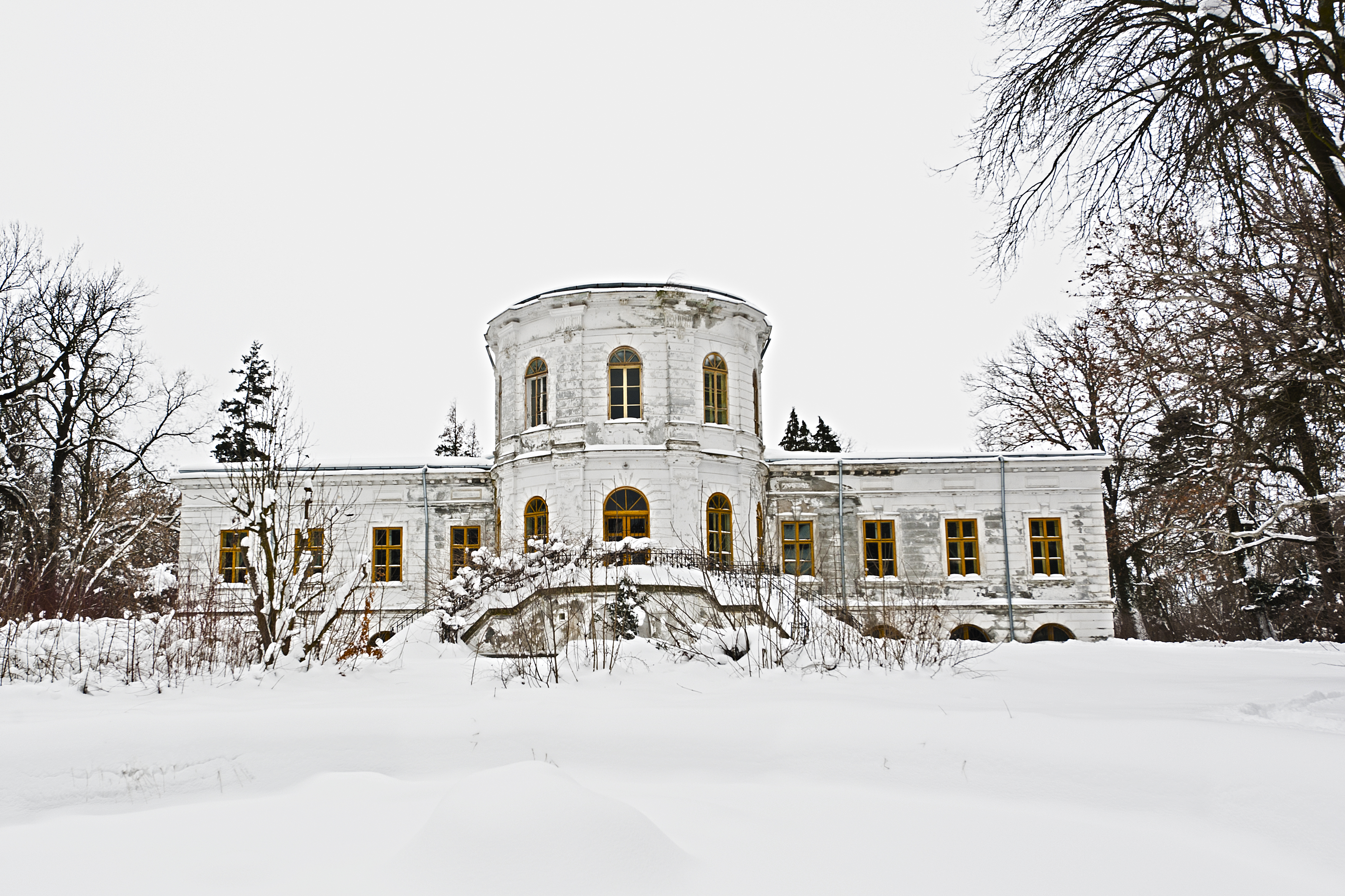 Ansamblul fostului palat Alexandru Ghica